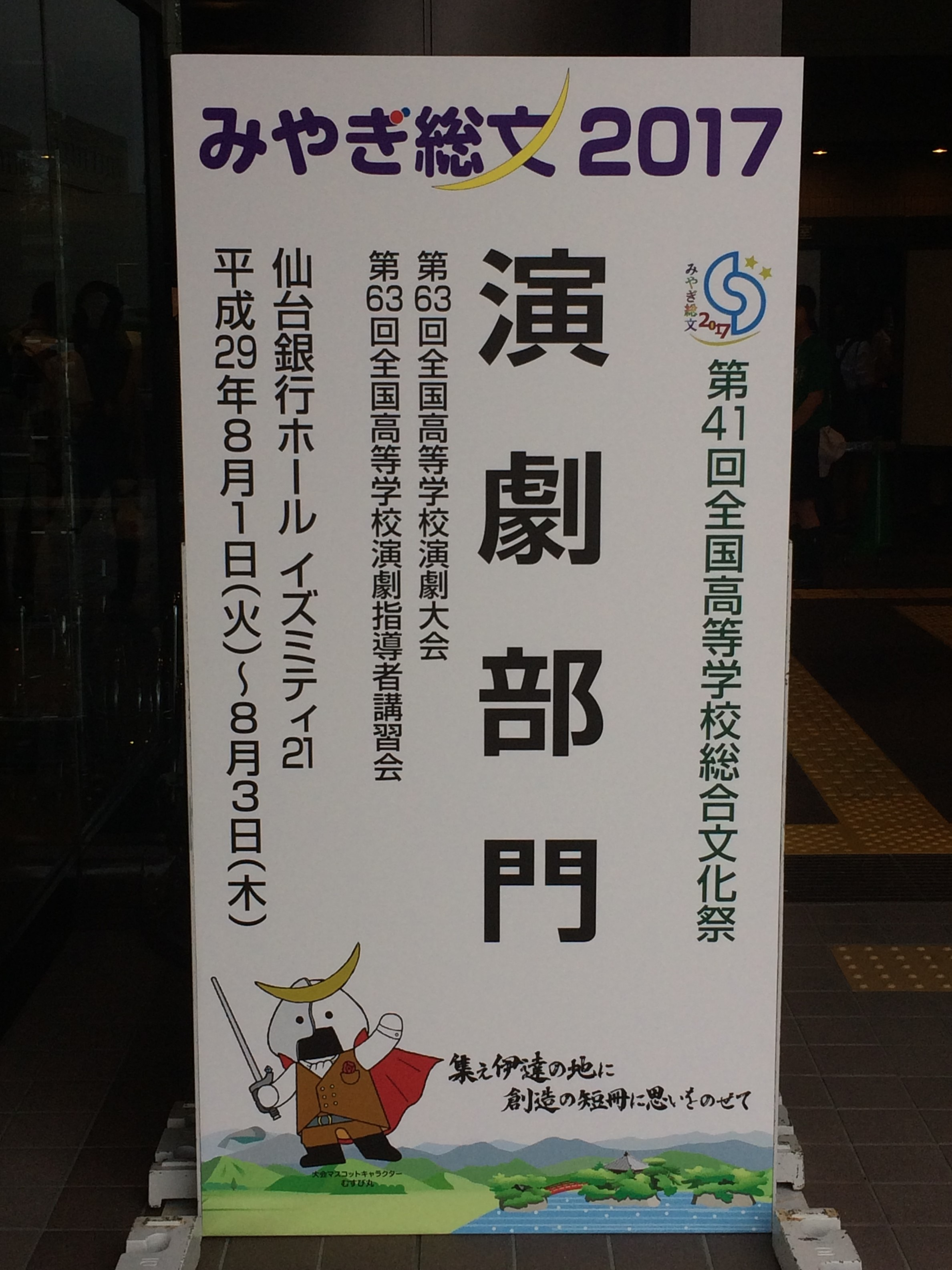 第63回全国高等学校演劇大会・会場の看板